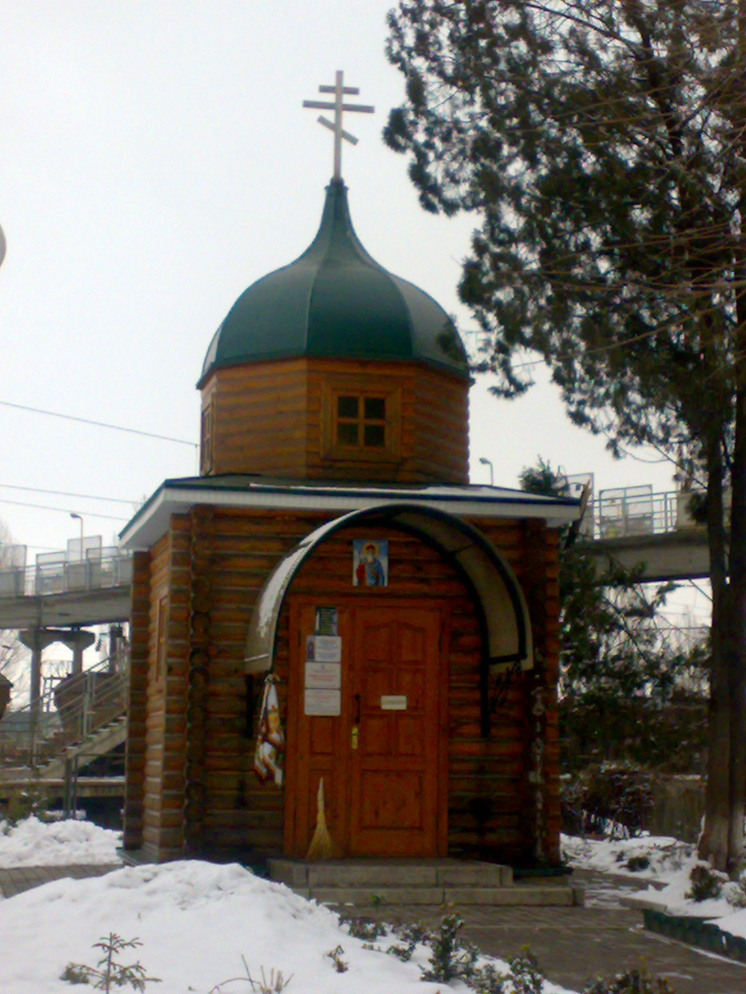 Каплиця біля вокзалу у Білій Церкві